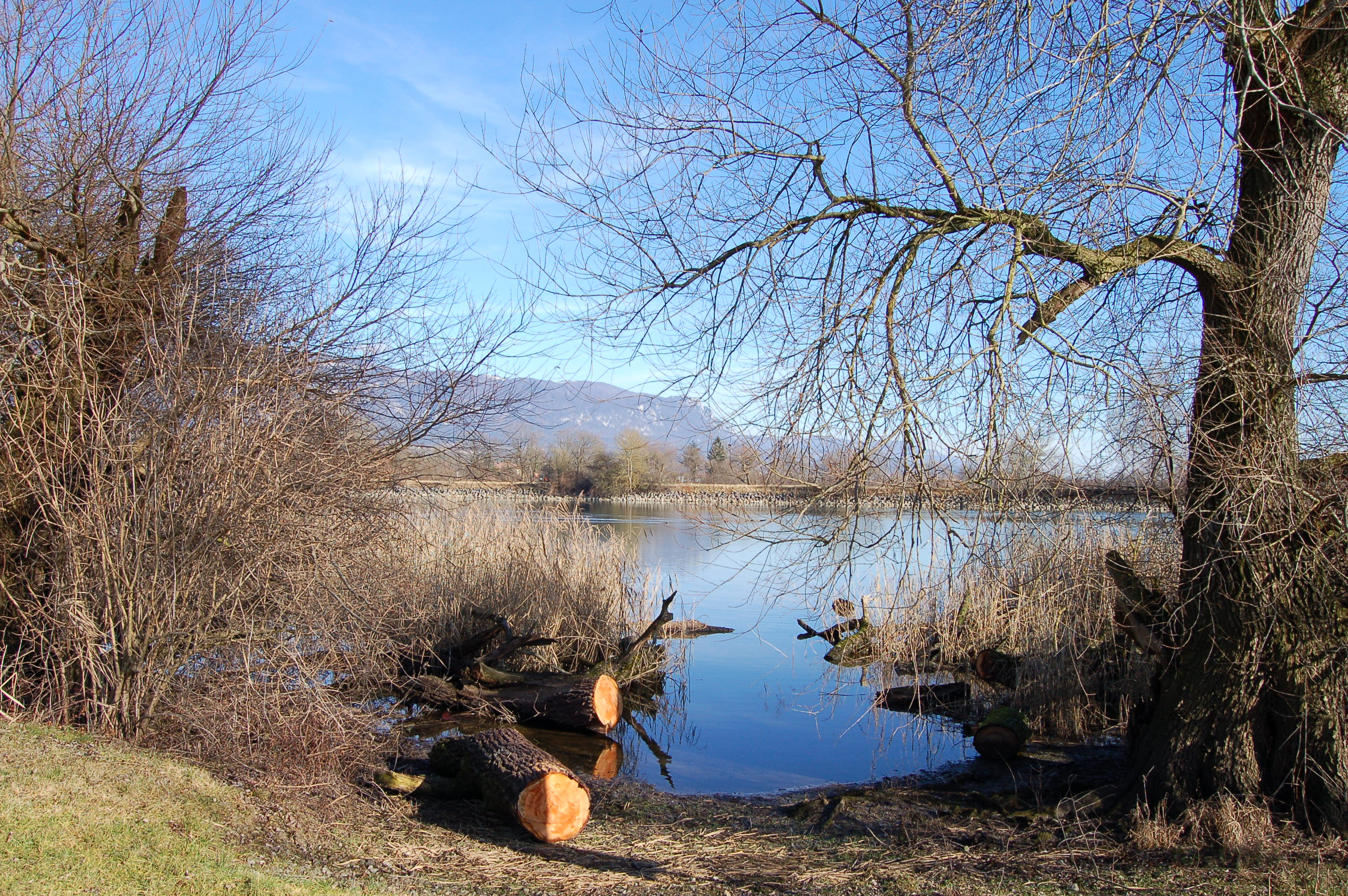 Aare bei Grenchen richtung Altreu